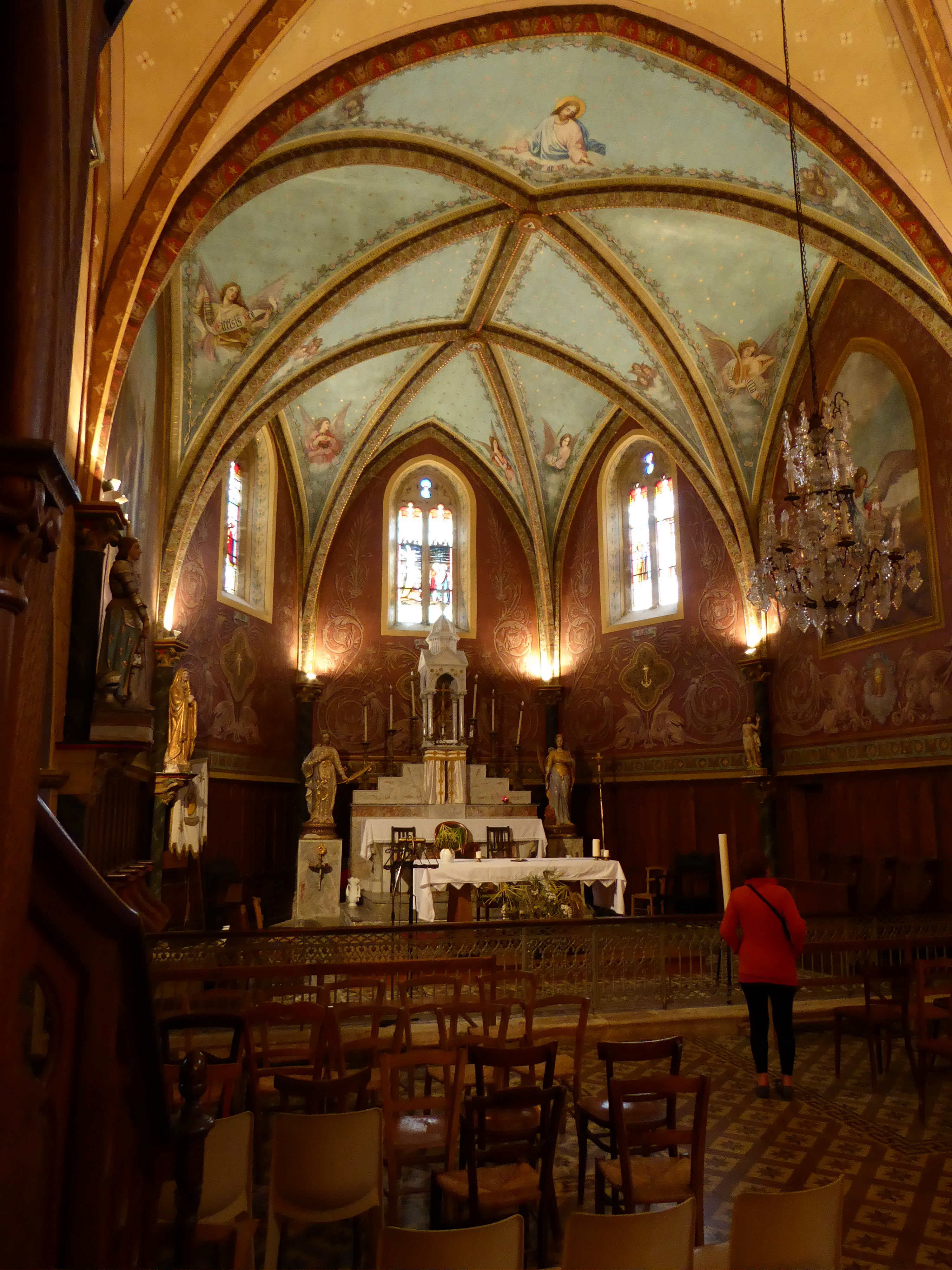 Église Sainte-Blandine de Castet-Arrouy